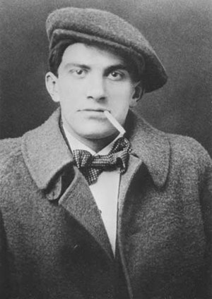 В. Маяковский. Фото 1915 г.